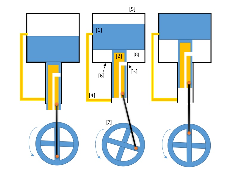 בתרשים מתוארים שלוש השלבים בפעולת מנוע מנסון משמאל לימין כאשר השלב הראשון מתחיל מיד לאחר סיום ההתפשטות והשלב האחרון נגמר בהתחלת ההתפשטות מחדש. [1] הוא הבוכנה עצמה, [2] הוא האוויר במיכל, [3] הוא פתח כניסת האוויר למיכל, [4] הוא פתח יציאת האוויר מהמיכל, [5] הוא הקצה שיש לחמם ו[6] הוא גלגל התנופה שמחובר לבוכנה.